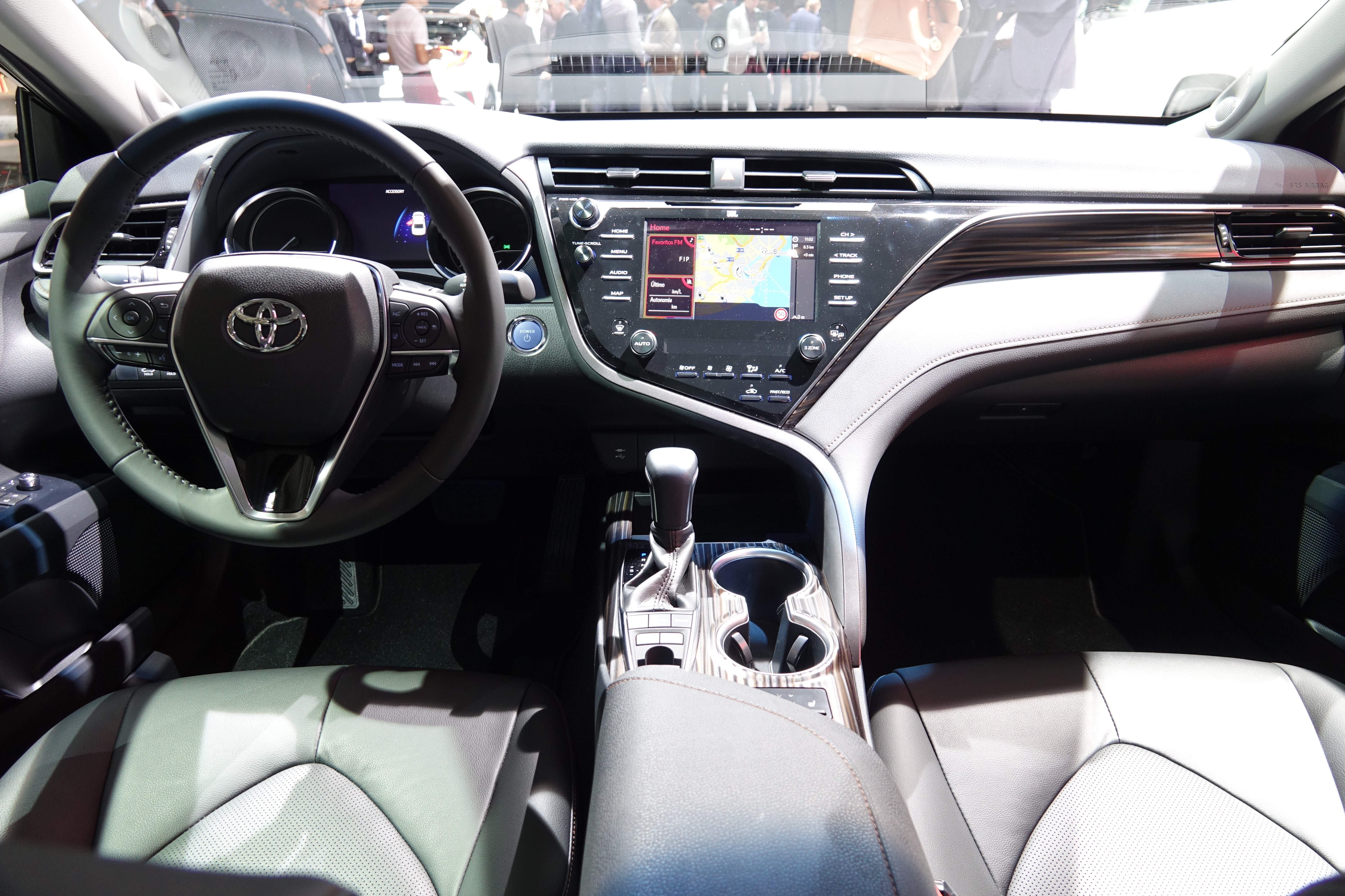 Toyota Camry Hybrid au Mondial Paris Motor Show 2018